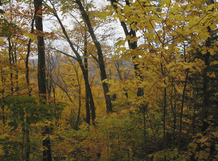 Forêt ancienne du Mont Wright, parc public de promenade et d'escalade à Stoneham-et-Tewkesbury au nord de la ville Québec dans région administrative de la Capitale-Nationale. Province de Québec, Canada.